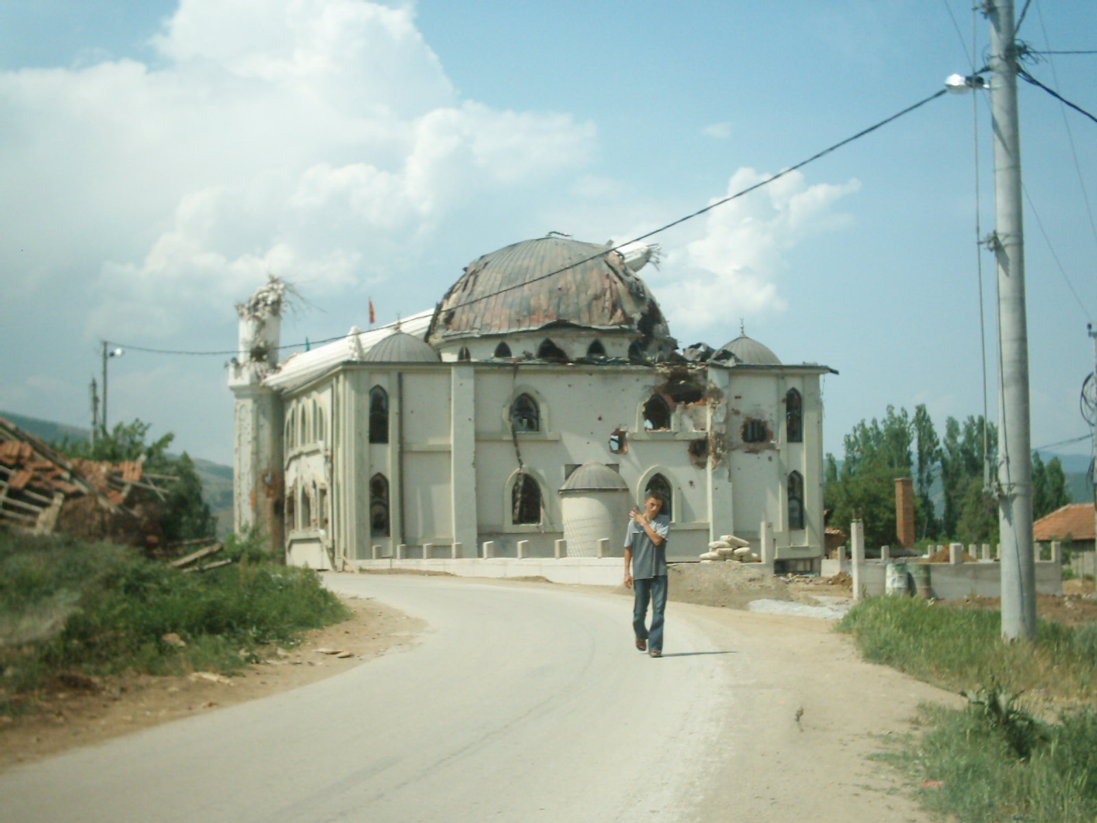 Matejče